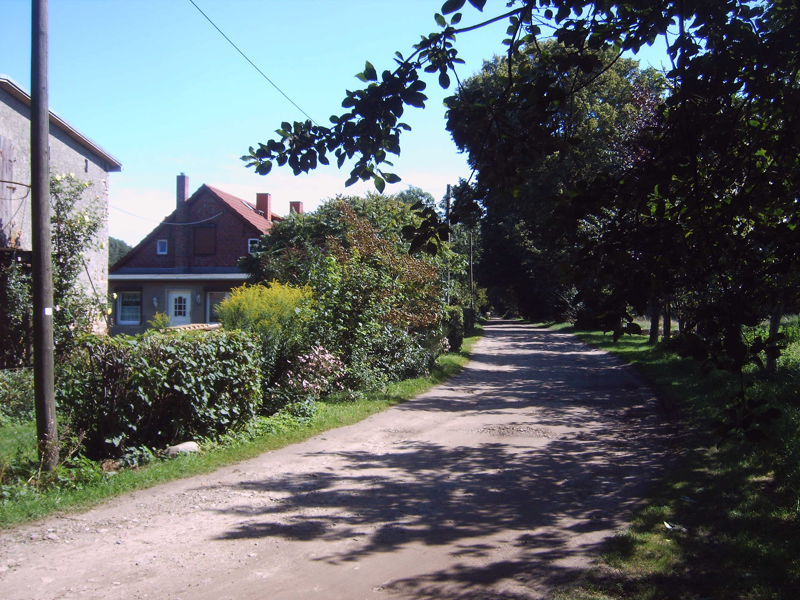 Weg durch Alt Güstelitz, Putbus, Rügen, Deutschland